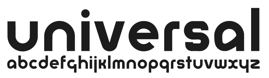 Universal-Schrift von Herbert Bayer ohne Unterscheidung von Groß- und Kleinbuchstaben